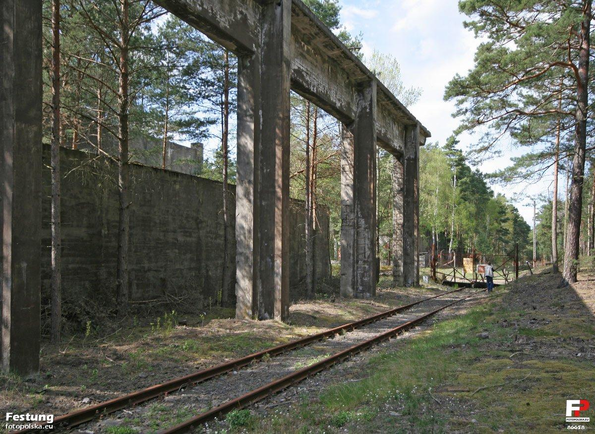 W tym miejscu nie kończy się teren fabryki, następna jej część (ok. ⅓ powierzchni) jest obecnie we władaniu wojska i zakładu karnego. Wojsko przejęło magazyny dawnej fabryki: na jednej z dróg powiatowych wiodących wzdłuż jednostki widać zmagazynowane w dużej liczbie, rdzewiejące gąsienice czołgowe.